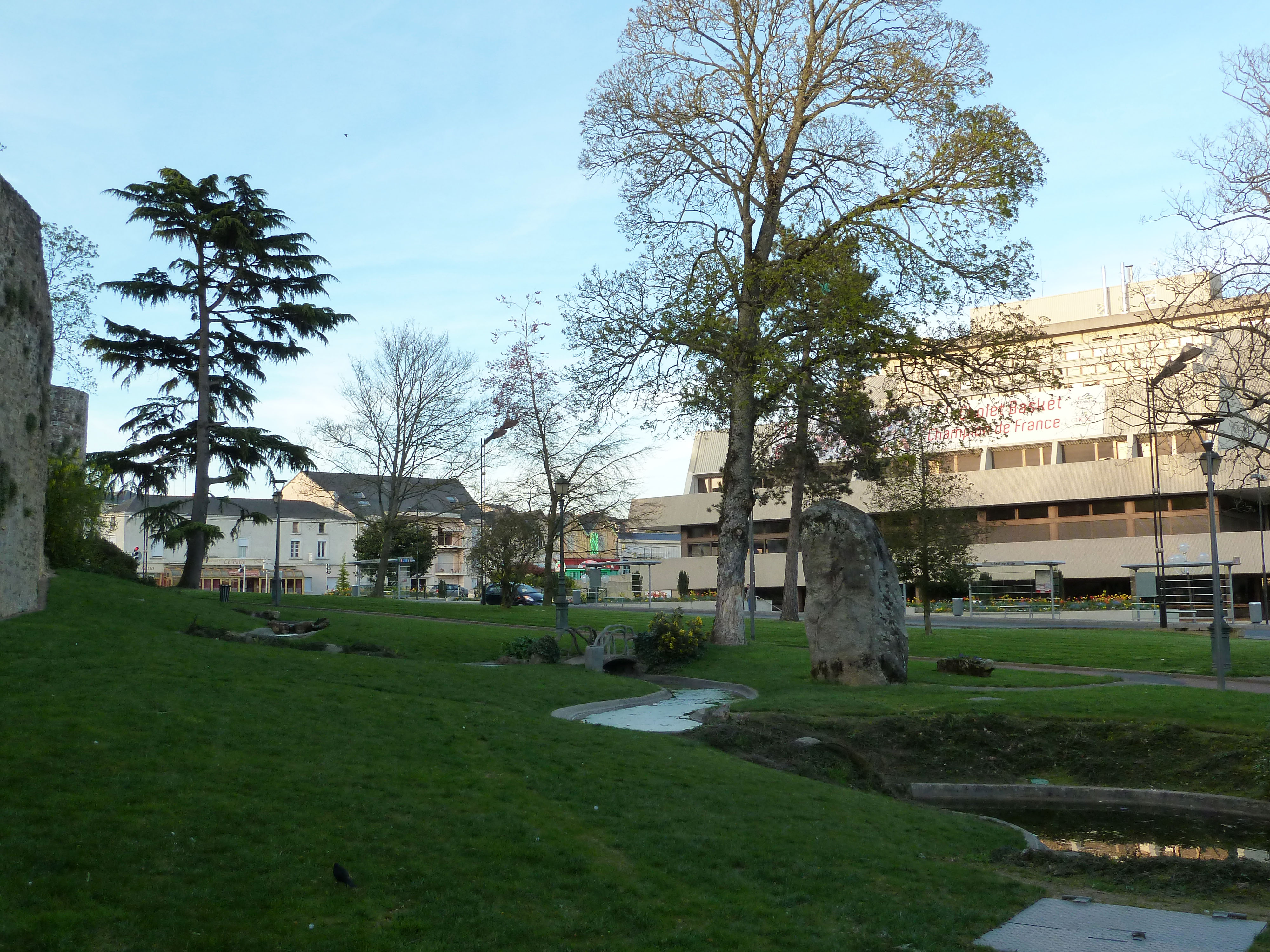 Vue sur l'hotel de ville